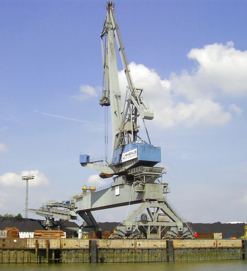 Hafenkran in Nordenham (Unterweser) (so genannte "Wippe")